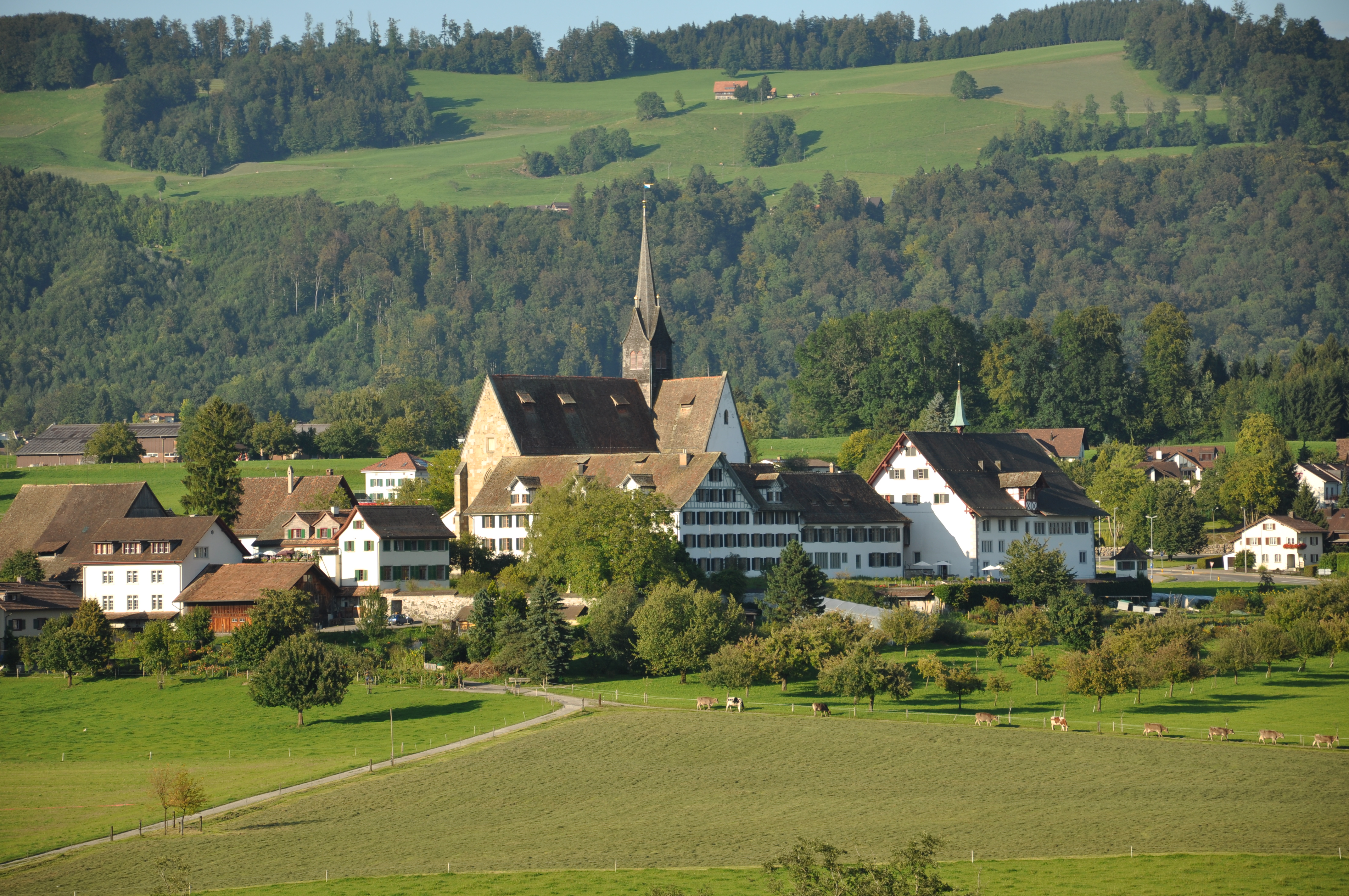 Kappel am Albis Ehemaliges Zisterzienserkloster